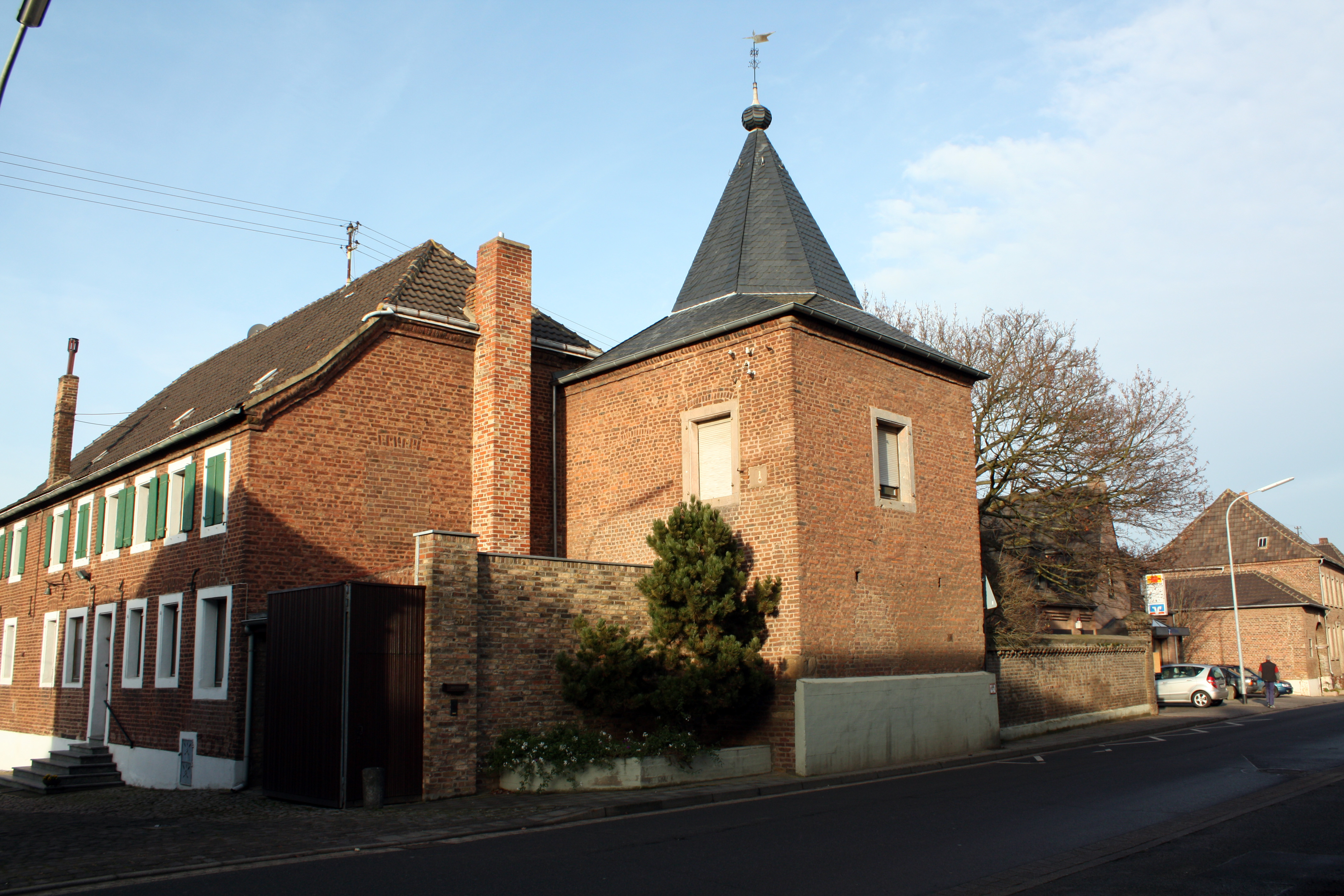 Erftstadt-Erp, Schleidenhof